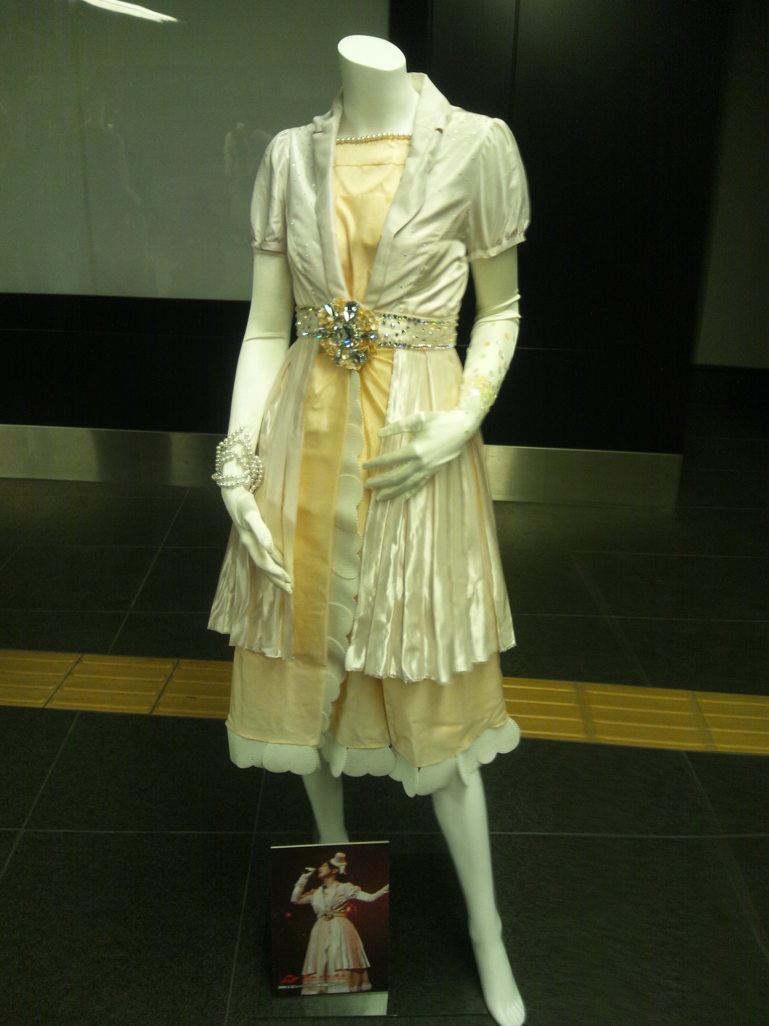 アニメロミックス Presents Minori Chihara Birthday Live 2012 supported by JOYSOUND 衣装展覧会より 『Minori Chihara Live Tour 2009 〜Parade〜』の衣装。